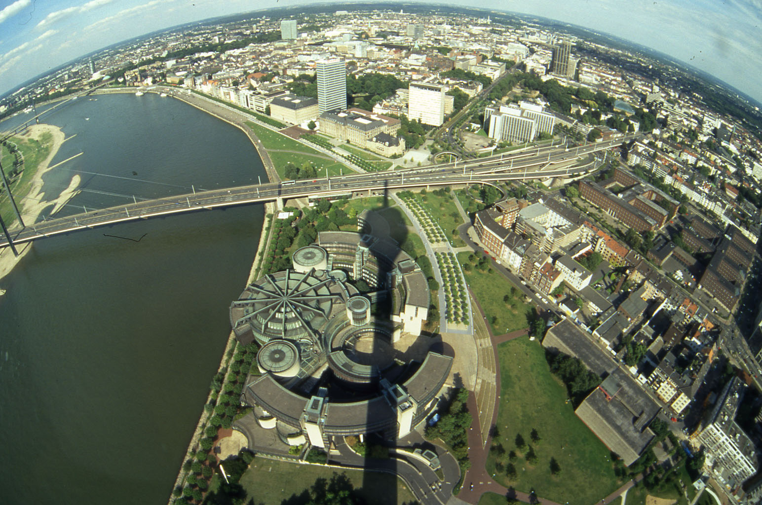 Blick vom Rheinturm auf Düsseldorf.